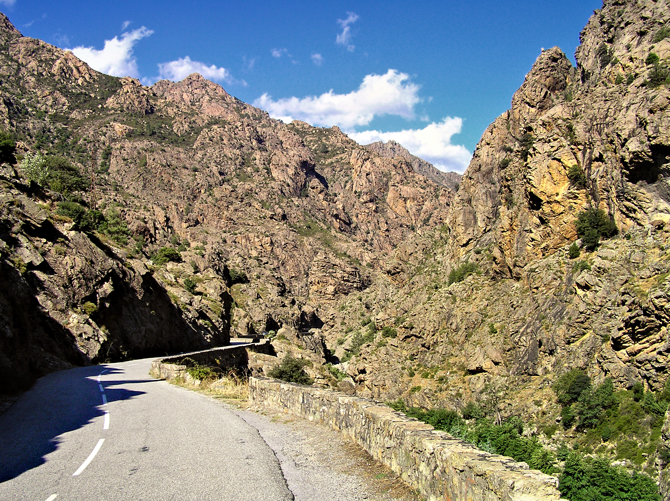 Corscia (Corsica) - Scala di Santa Regina